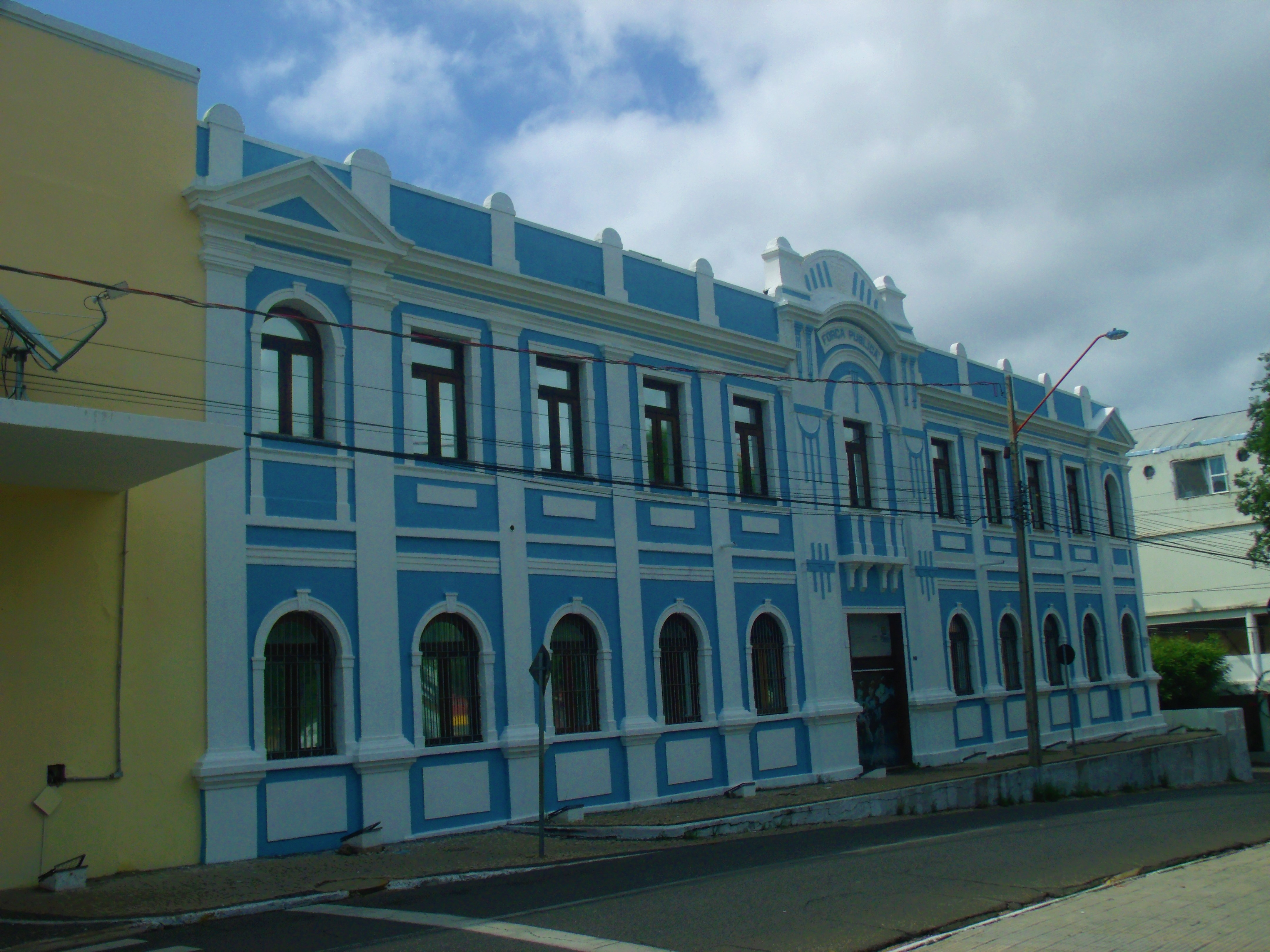 Vista do edifício da Força Pública, na praça Pedro II, em Teresina, Piauí.